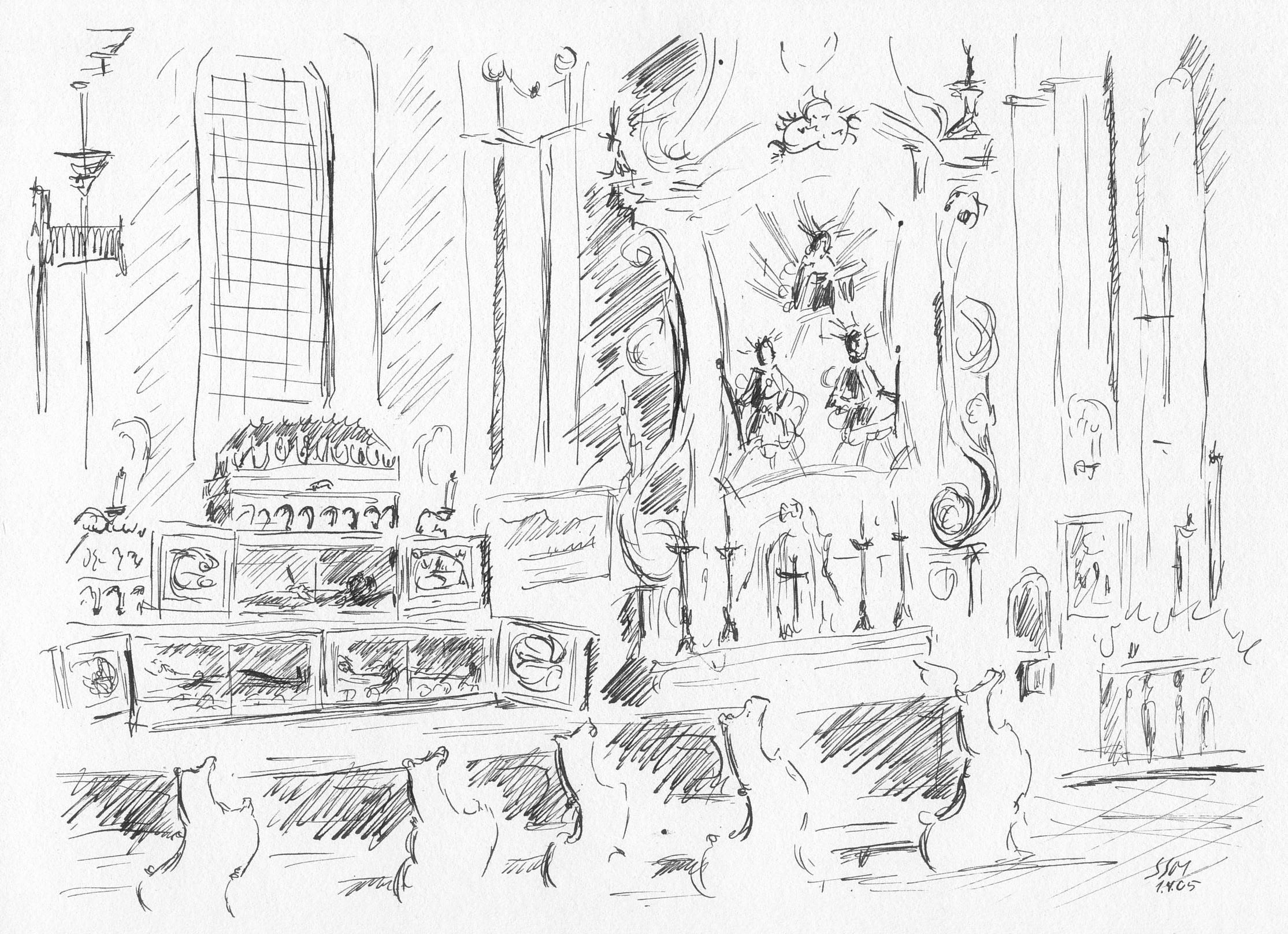 Griesstetten bei Dietfurt an der Altmühl, Wallfahrtskirche zu den "Drei Elenden Heiligen", Inneres. Tuschfederzeichnung von Siegfried Schieweck-Mauk, Eichstätt, Werk-Verz. Nr. 1148